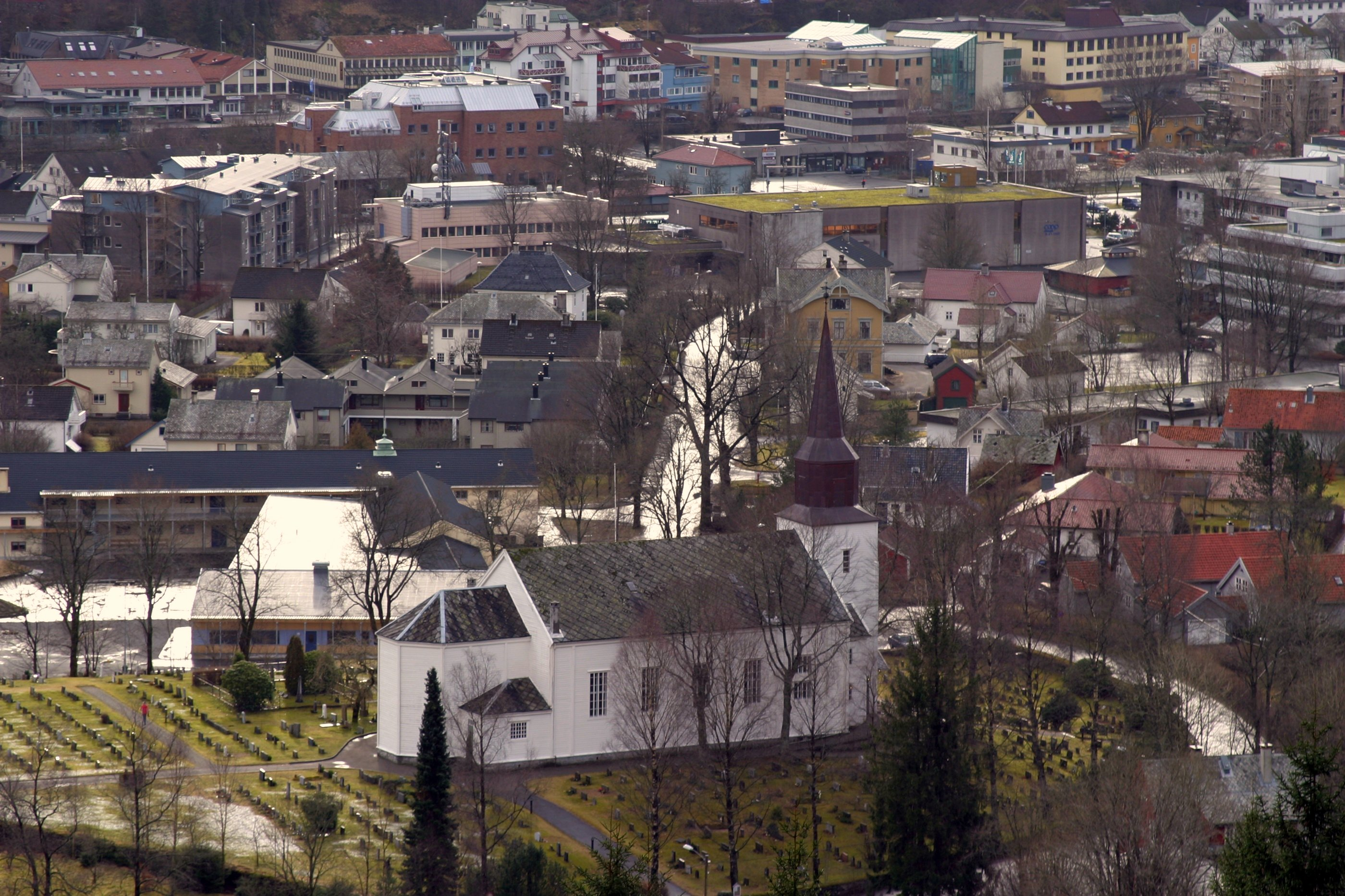 Førde church, Førde municipality, Sunnfjord region, Sogn og Fjordane county, Norway. Built in 1885. Frå NRKs Fylkesleksikon: Førde kyrkje, bygd 1885. Arkitekt J.W. Nordan, byggmeister Iver Løtvedt. Altartavle frå 1643, rekna som eit nasjonalt praktstykke frå barokken. Gåve frå prest Peder Jørgenson Finde og kone Barbra Nitter. Preikestol frå 1672. Epitafium frå 1681 framstiller kjøpmann Hans Andersson Findmand med familie. Måleri frå 1686, motiv Himmelfarten. Kyrkjeklokker frå 1776 og 1934. Biletvev i kyrkjeskipet av Marit Erland framstiller kyrkjeåret. Messehakel frå 1671 i Bergen Museum. Pulpitur (del av kyrkjestol) frå 1681 på Norsk Folkemuseum.